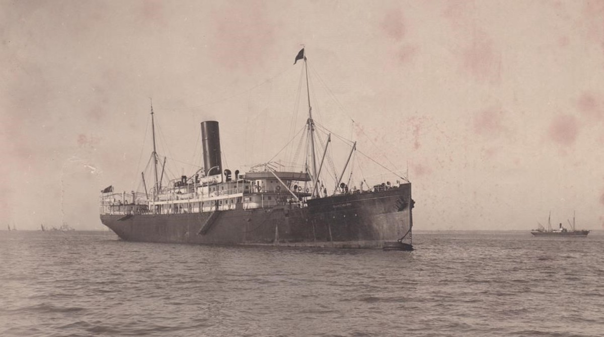 Vapor correo de Filipinas Carlos de Eizaguirre, Compañía Trasatlántica Española (1910-1917).